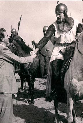 Principe Juan Carlos e El Cid